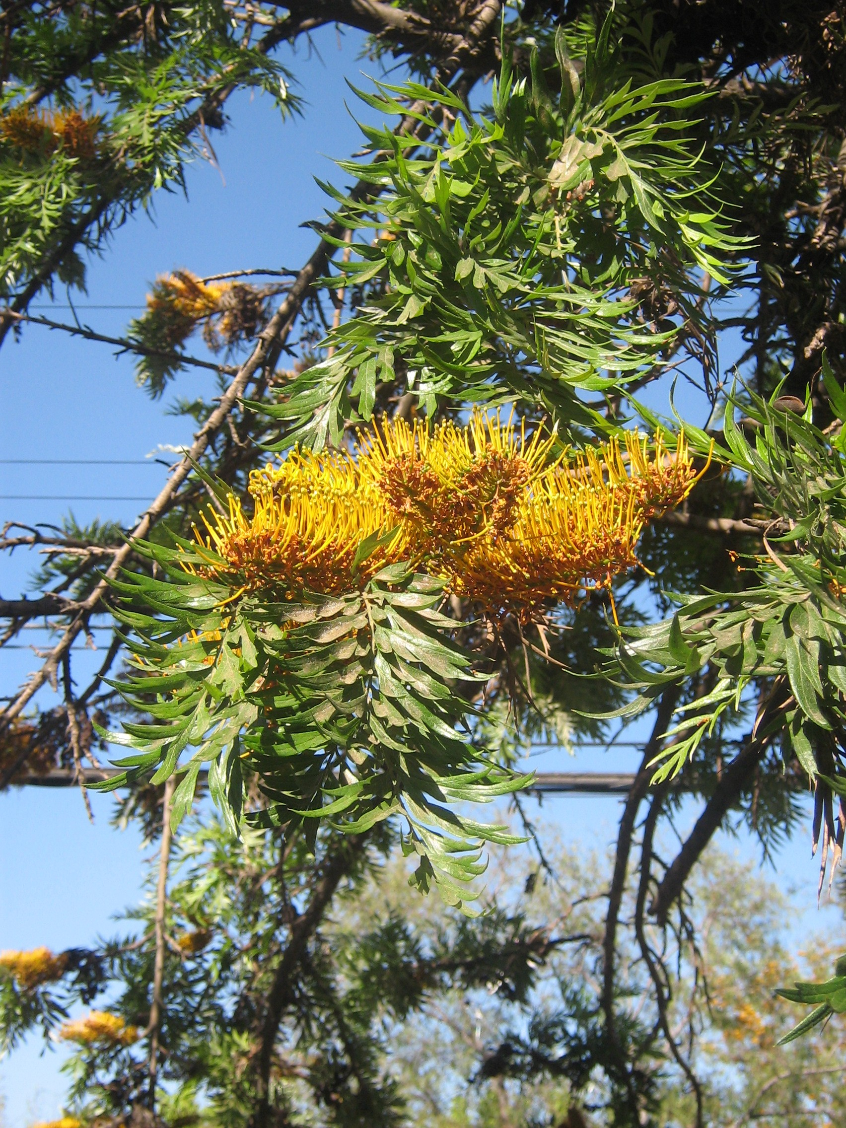 Grevillea robusta A.Cunn.ex R.Br. vernáculo Grevillea